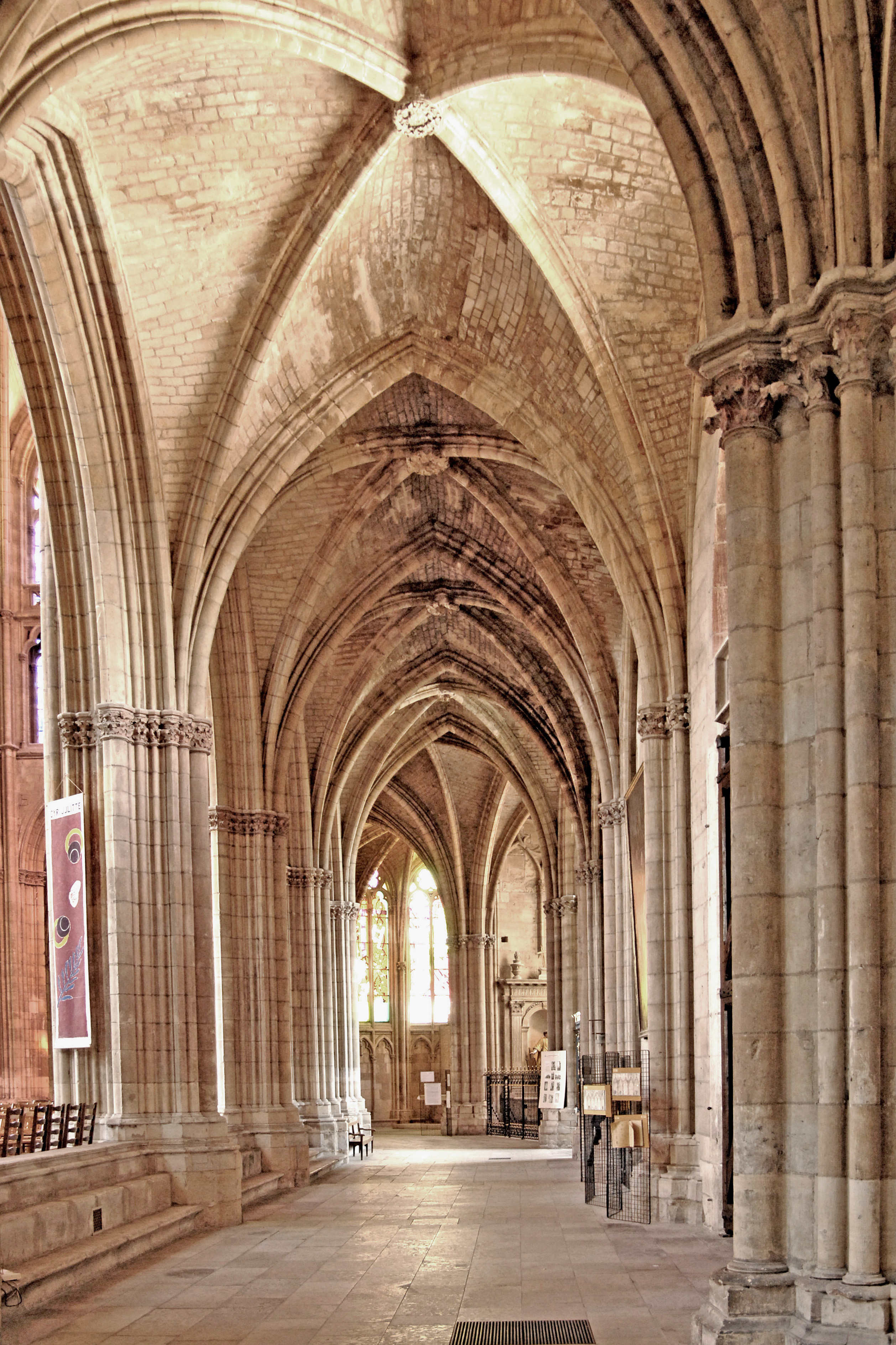 Kathedrale Nevers, südl. Chorumgang